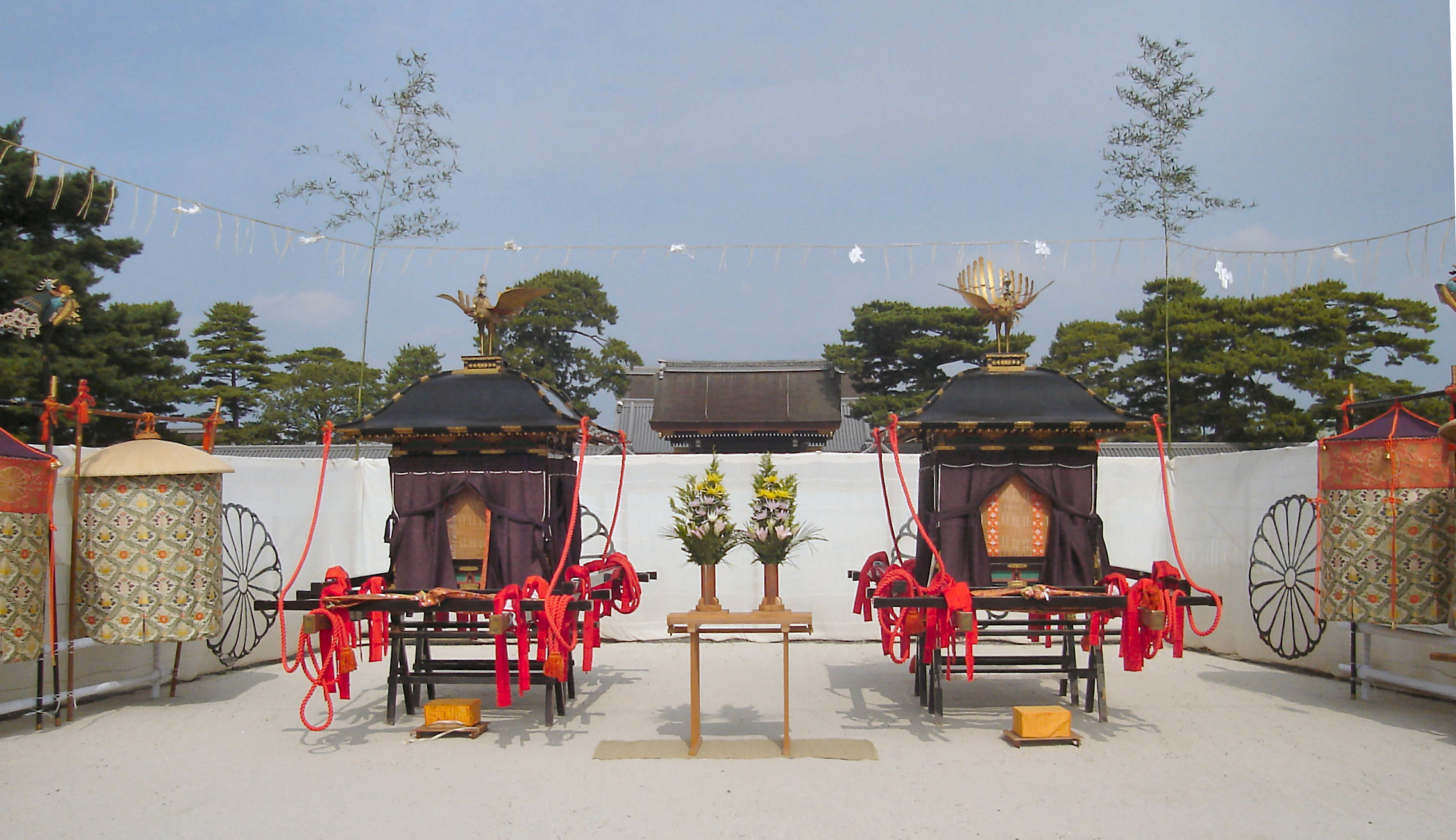 Jidai matsuri Horen (時代祭 鳳輦)